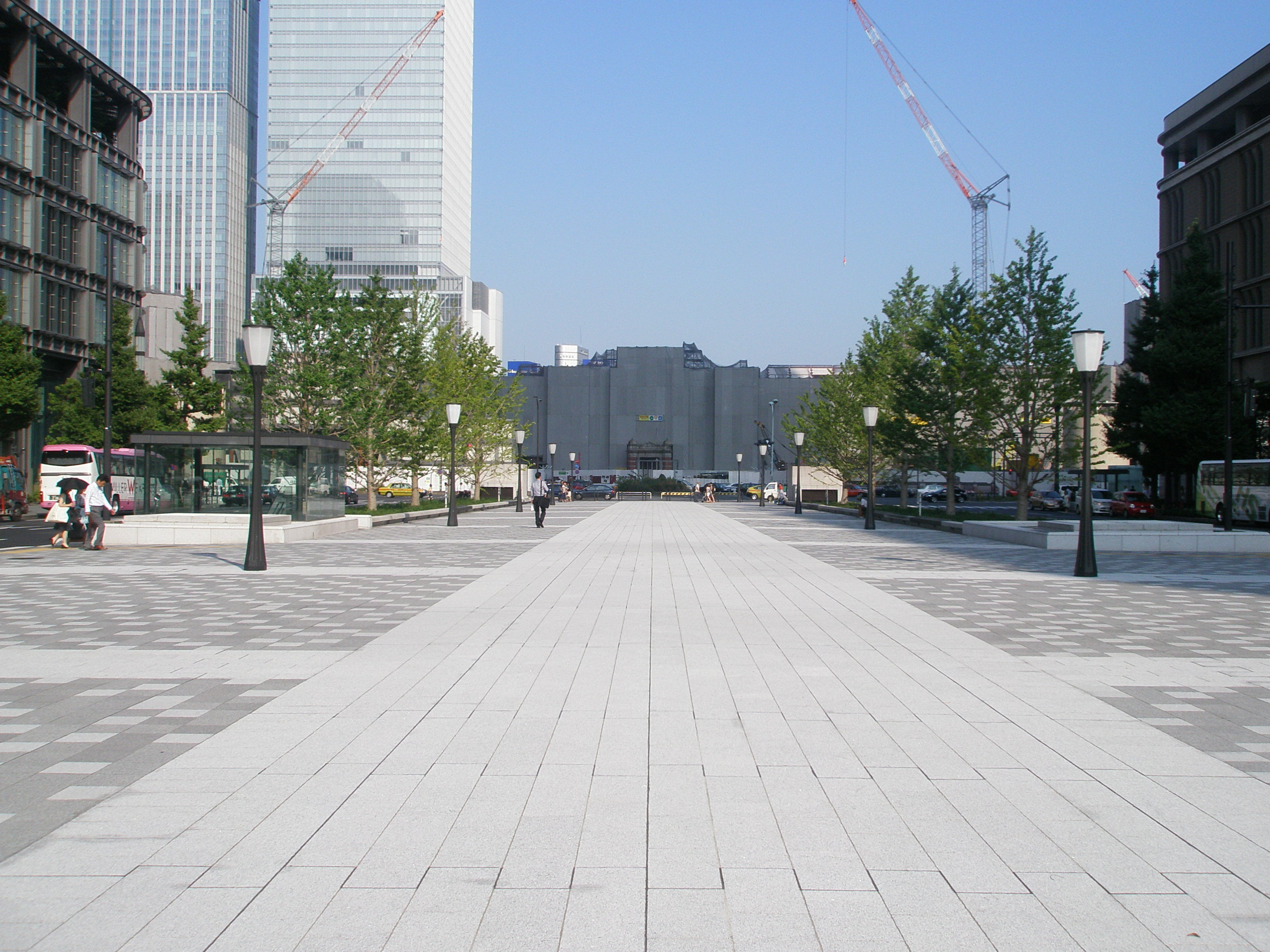 行幸通りから見た駅舎復元工事中の東京駅。この通りは2010年4月に再整備が完成し、道路の中央が広壮な歩道兼馬車道となった。